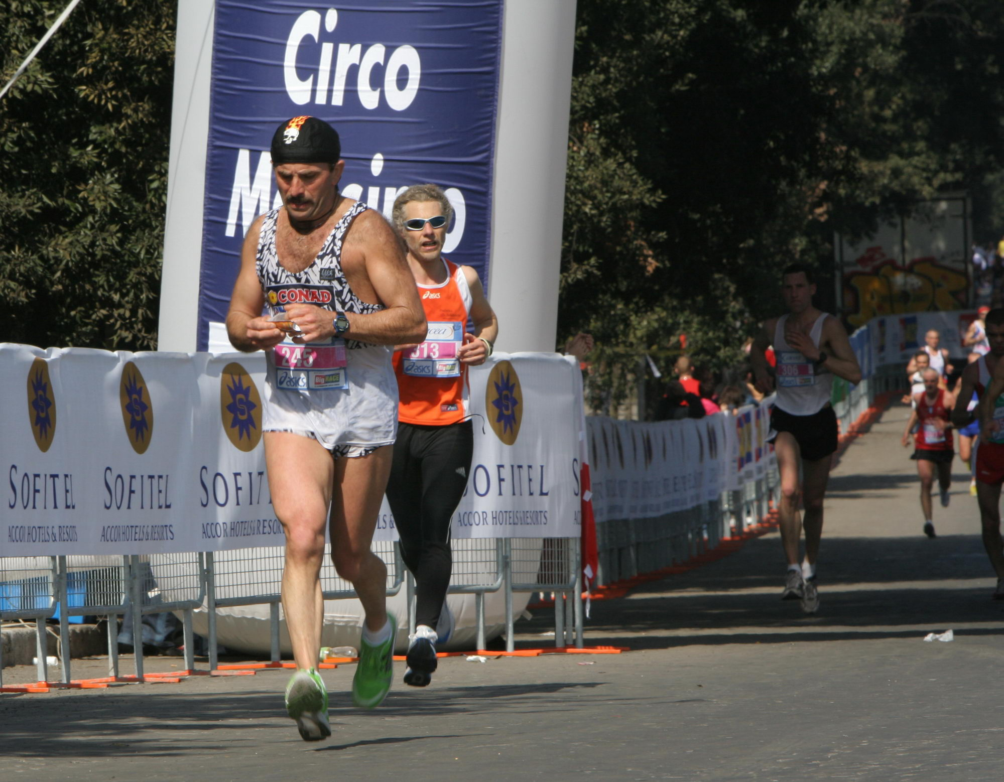 XII edizione della Maratona di Roma, 26 marzo 2006